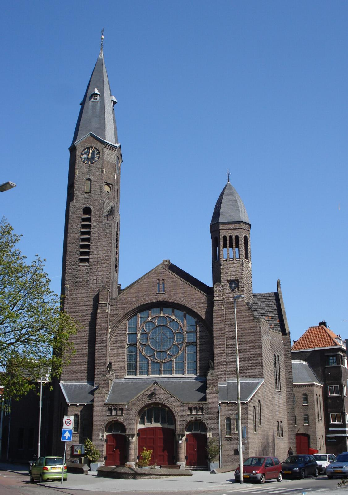 Rotterdam, Bergsingelkerk. Gemeentemonument.